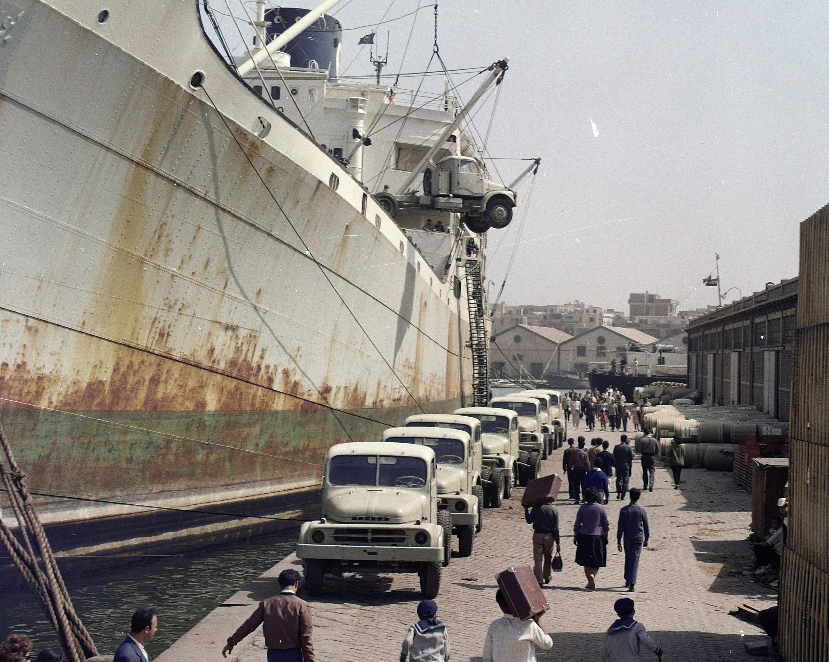 kikötő. Location: Egypt, Alexandria Tags: colorful, port, ship, commercial vehicle, Greenhorn-ship, Praga-brand Title: kikötő.